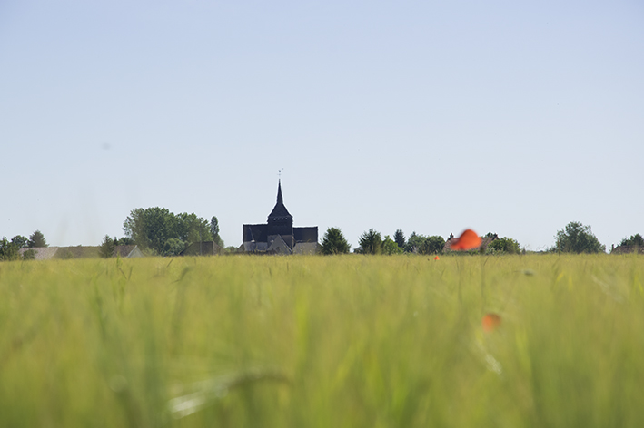 Le village de Maizières-la-Grande-Paroisse recèle de riches trésors dont son église datant du XII eme siècle.